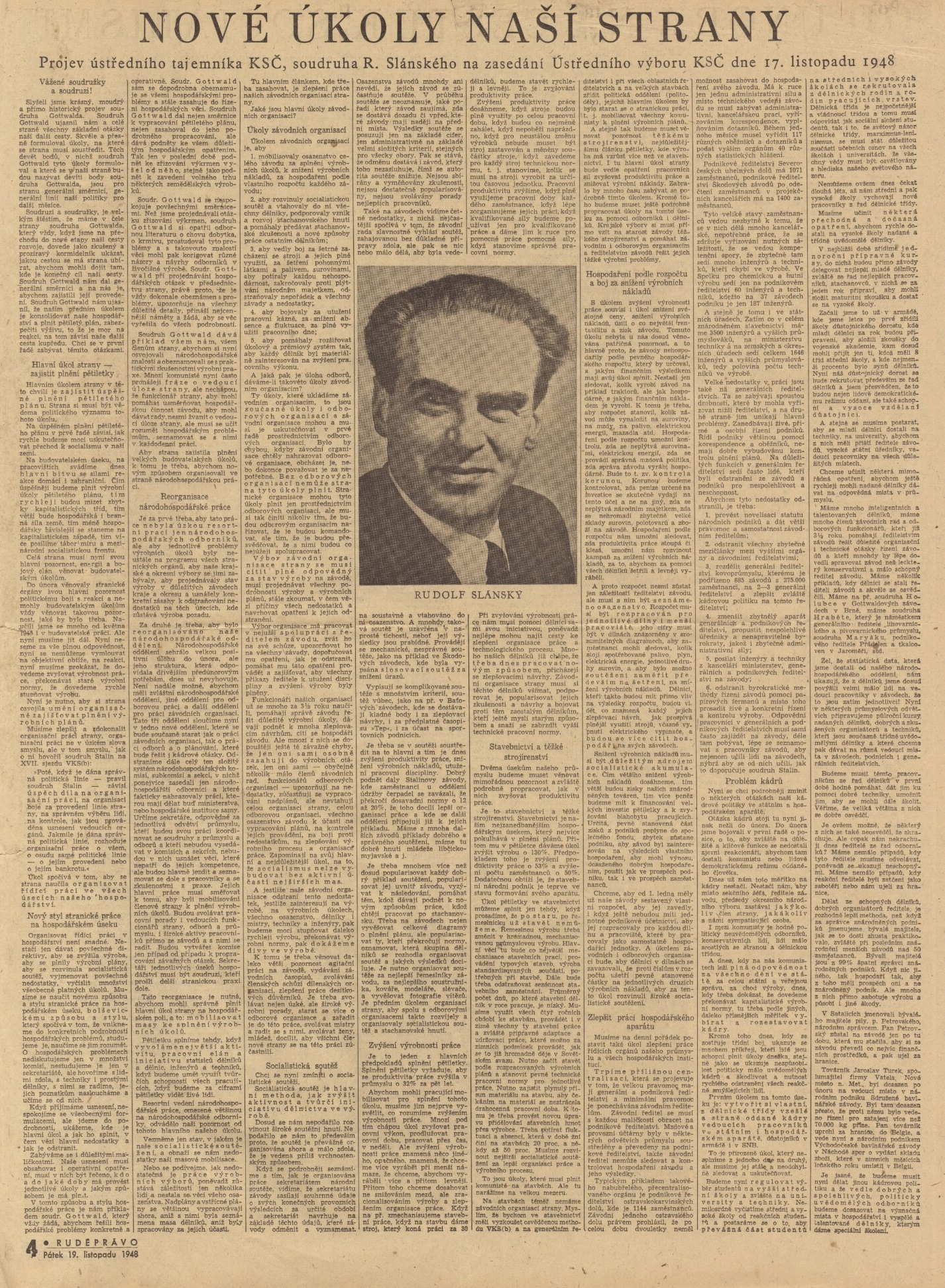 Noviny Rudé právo - vydáno 19.11.1948